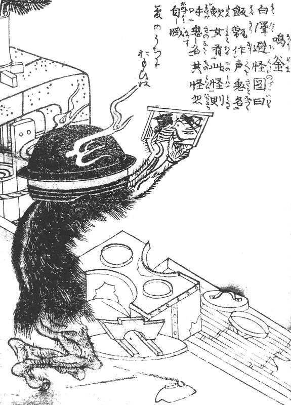 Narigama (鳴釜) from the Gazu Hyakki Tsurezure Bukuro (百器徒然袋)